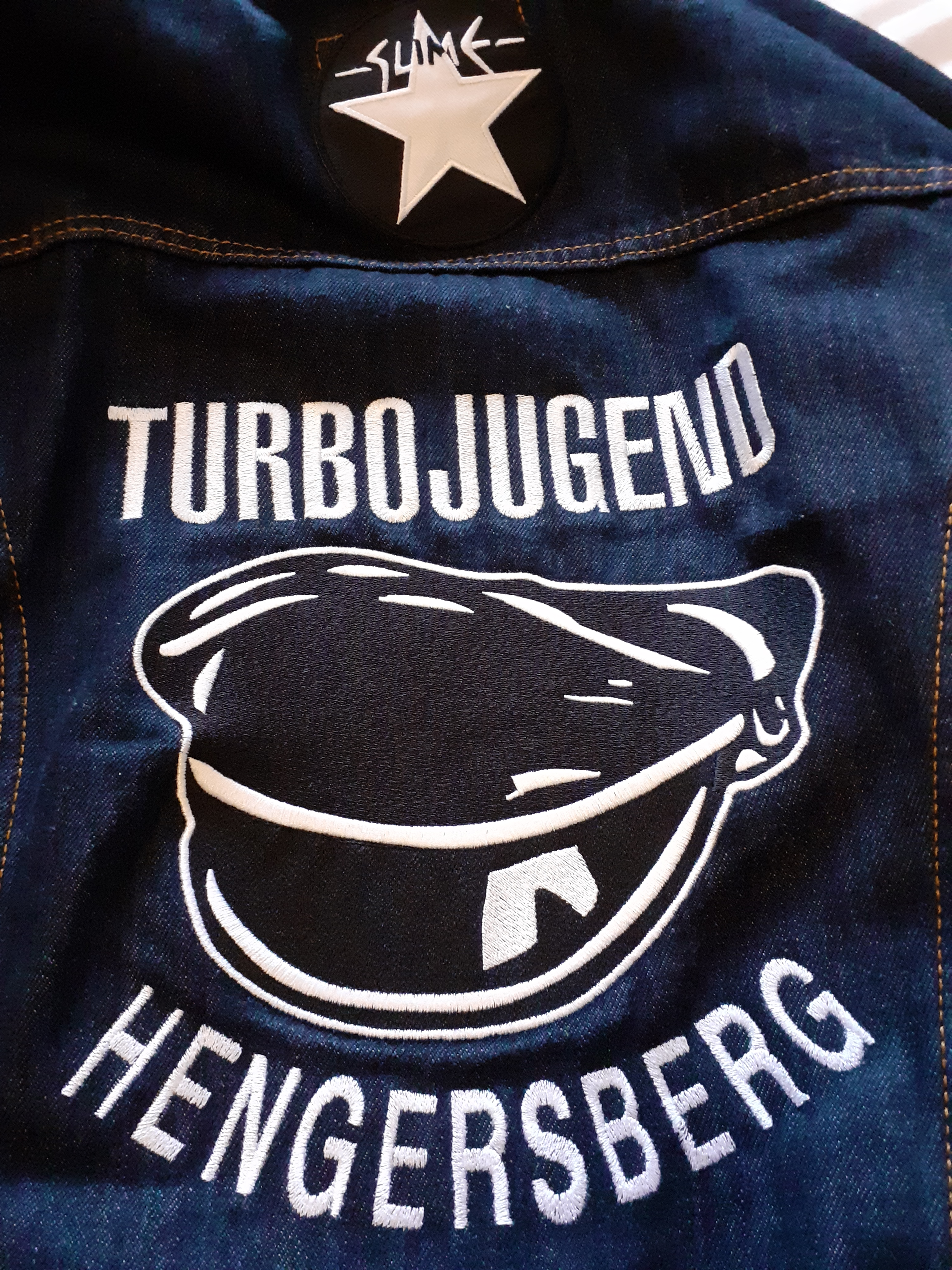 Rückenansicht einer bestickten Jeansjacke der Turbojugend Hengersberg. Als Turbojugend versteht man einen Fanclub der norwegischen Band Turbonegro.